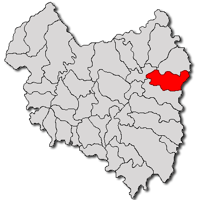 Categorie:Hărţi ale judeţului Covasna